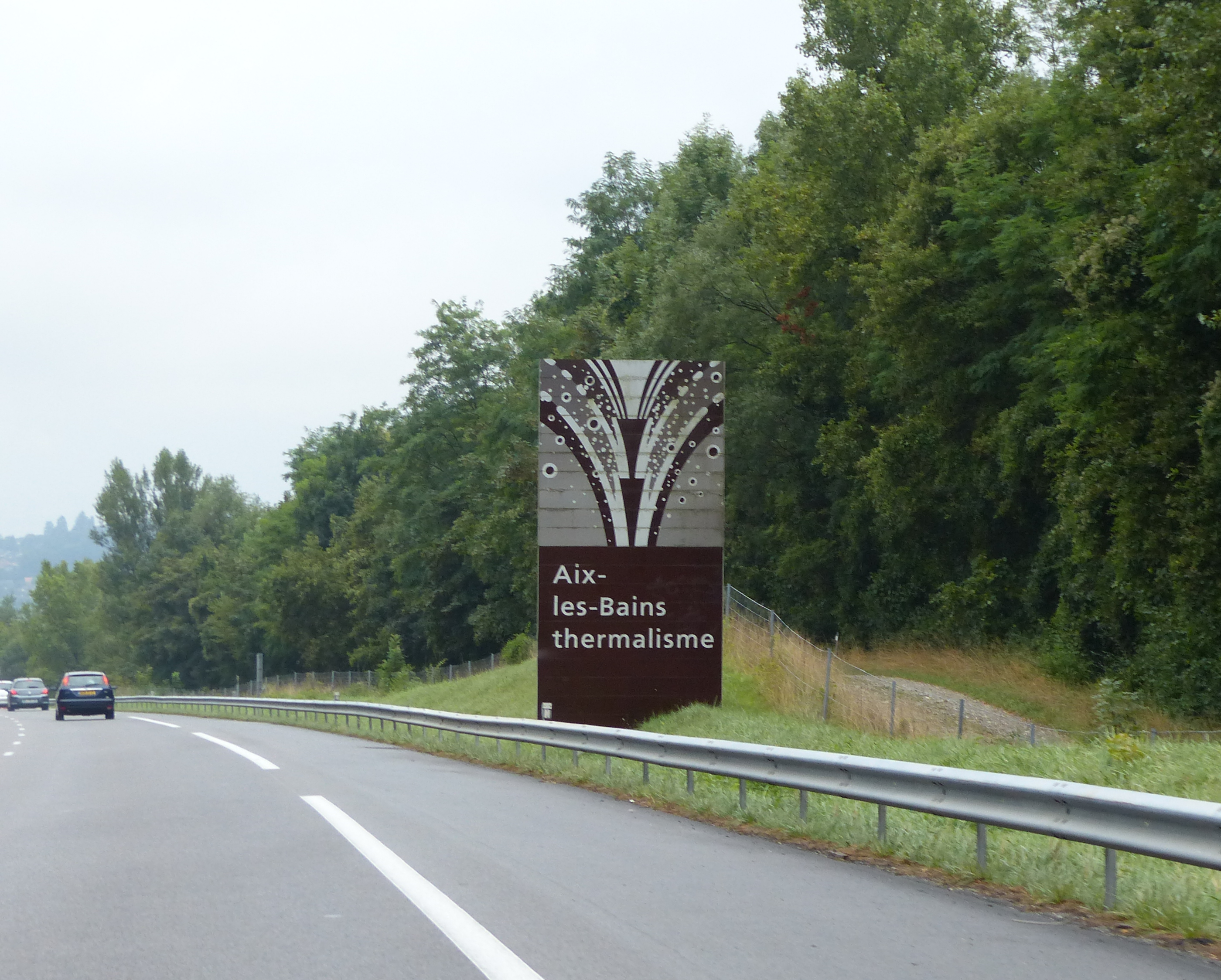 Panneau H13 Aix-les-Bains, autoroute A41, Grésy-sur-Aix, Savoie, France.